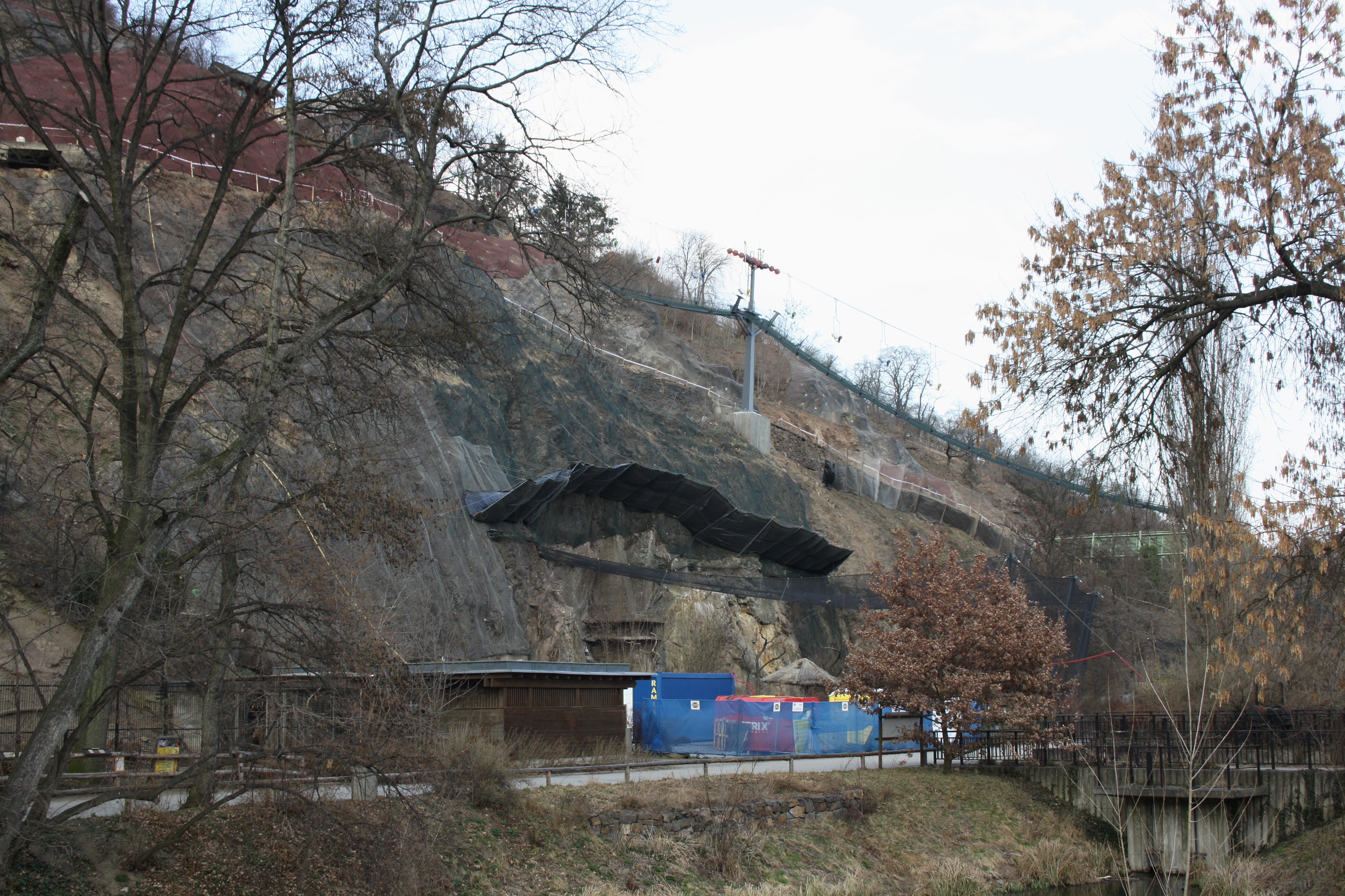 Pražská zoologická zahrada